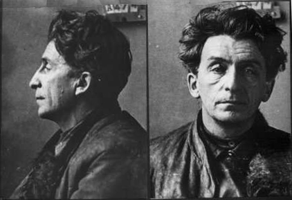 Флориан Флорианович Федорович (11 ноября 1876, Казань — 28 ноября 1928, Оренбург) — эсер, член ЦК ПСР, делегат Всероссийского Учредительного собрания, глава Политцентра.